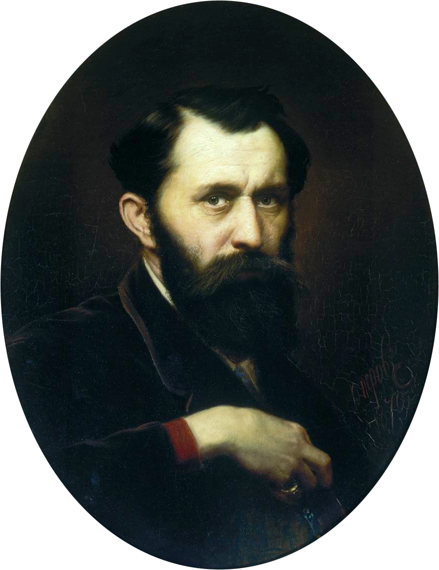 Self-portrait 1870